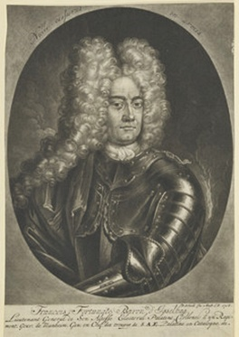 Franz Fortunat von Isselbach (1663-1734), kurpfälzischer und kaiserlicher Generalfeldzeugmeister